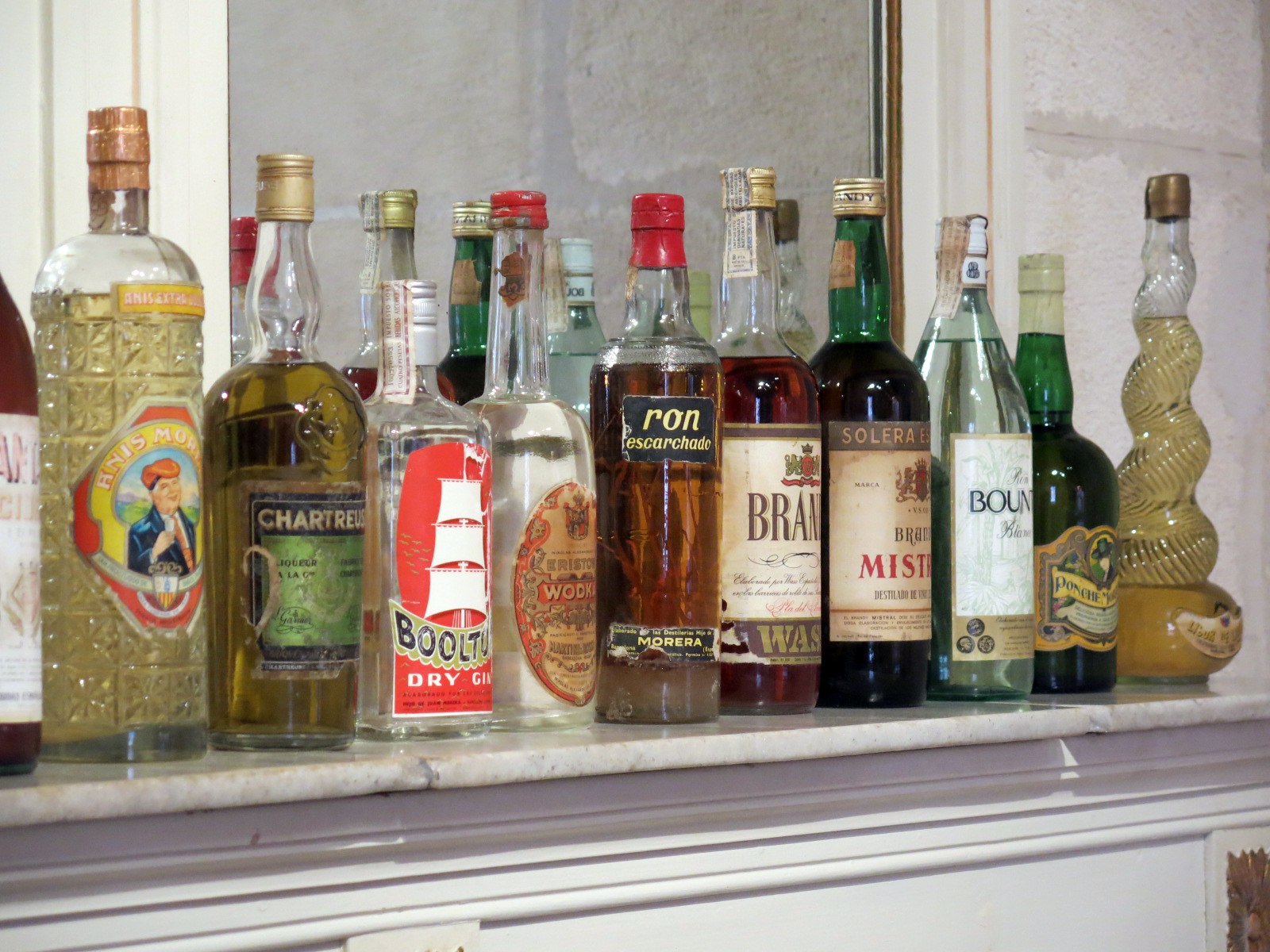 Palau Reial de Vilafranca del Penedès. Acull el museu VINSEUM, Museu de les Cultures del Vi de Catalunya)